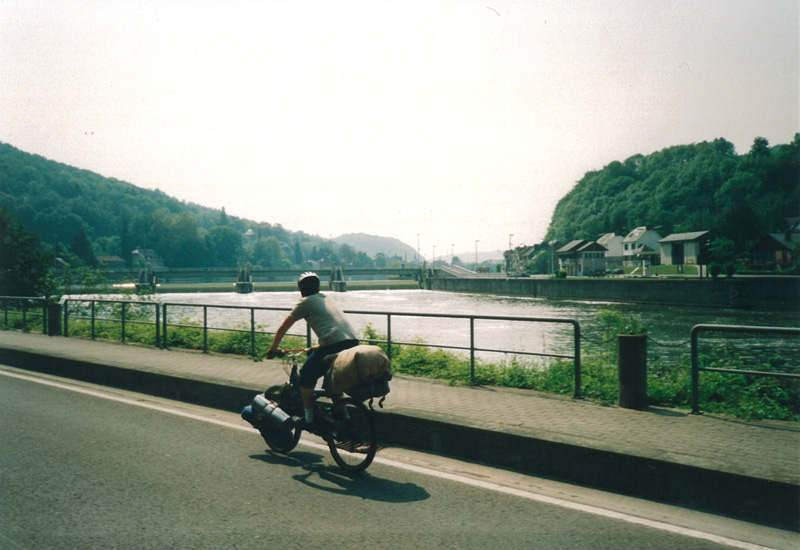 Foto zelf gemaakt tijdens fietsvakantie in België langs de Maas ten zuiden van Namur.